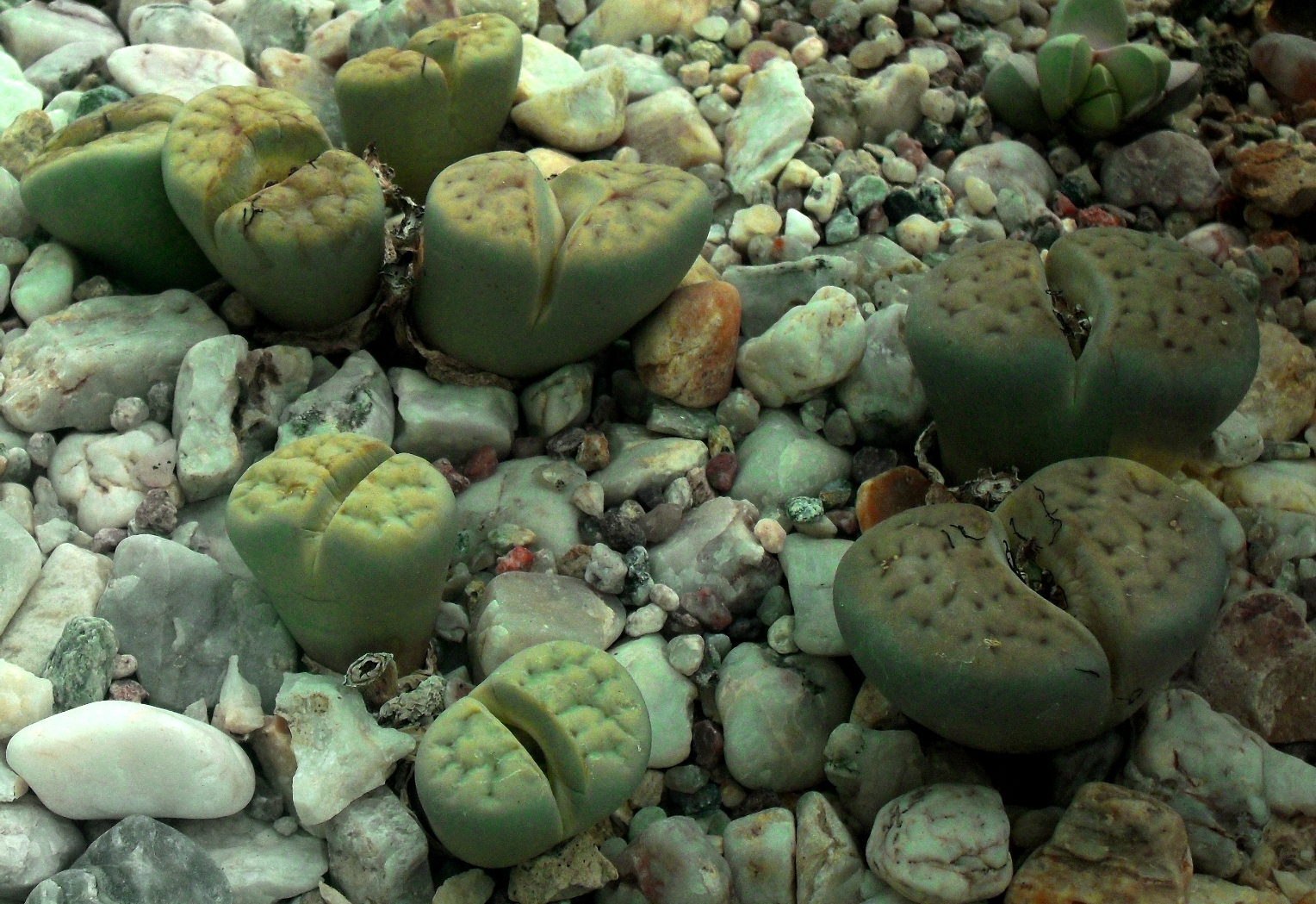 Lithops marthae - Botanischer Garten Leipzig